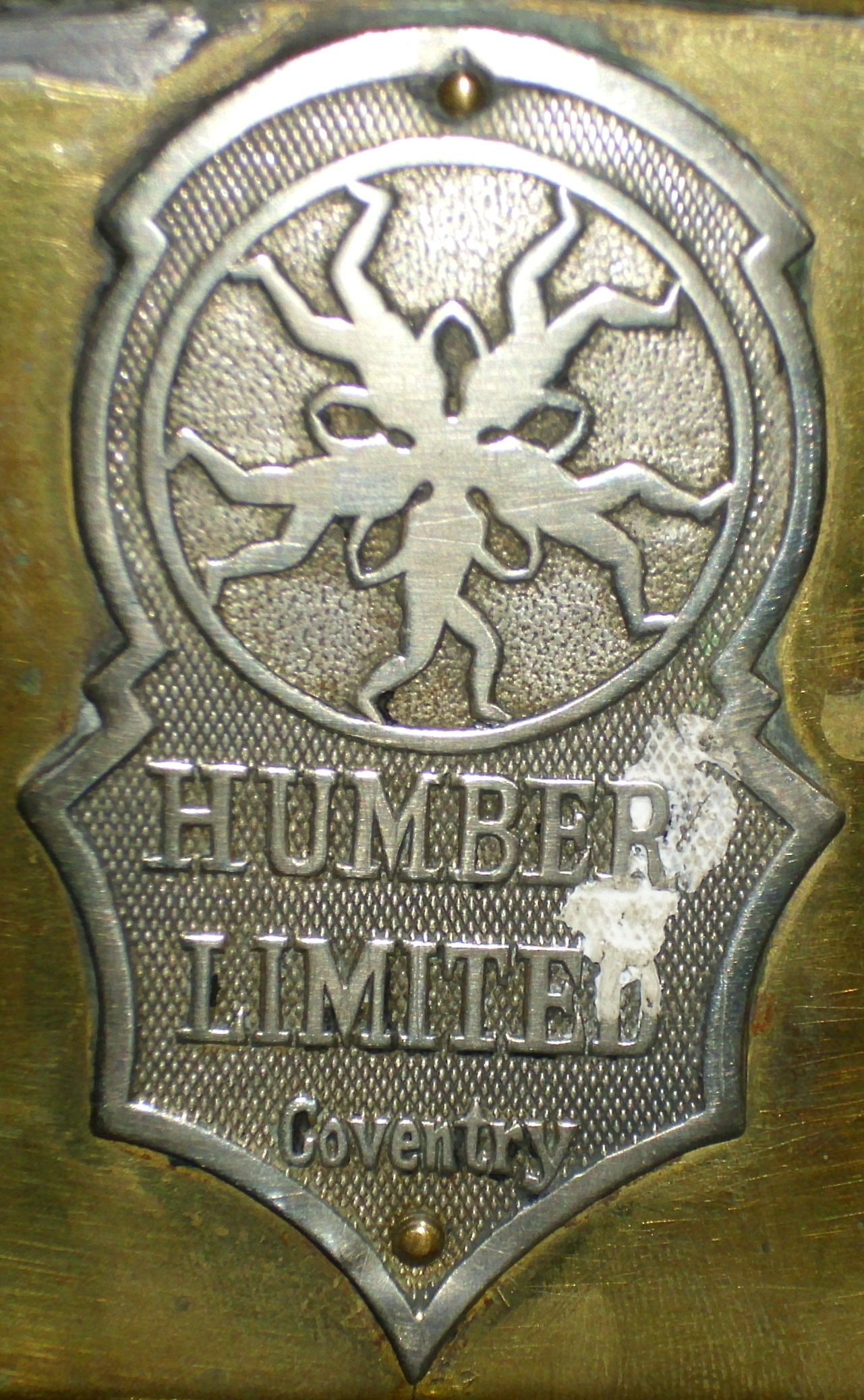 Emblem Humber